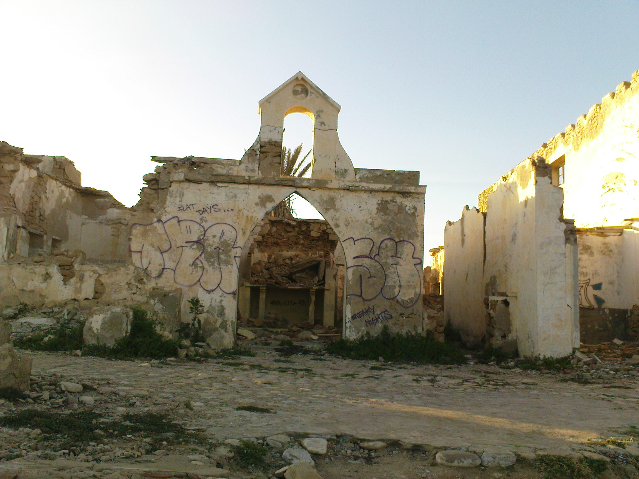 Tašlḥiyt/ⵜⴰⵛⵍⵃⵉⵜ: Ighrban n buyirdn: ighrman n buyirdn 02 km z taghazout, mad yagurn gh ighrban luzinat n srdil iblyun gh izlmd n taghazout tasgua nu agadir. tbid twurwins gh isgasn mya d sdiss idamraw.